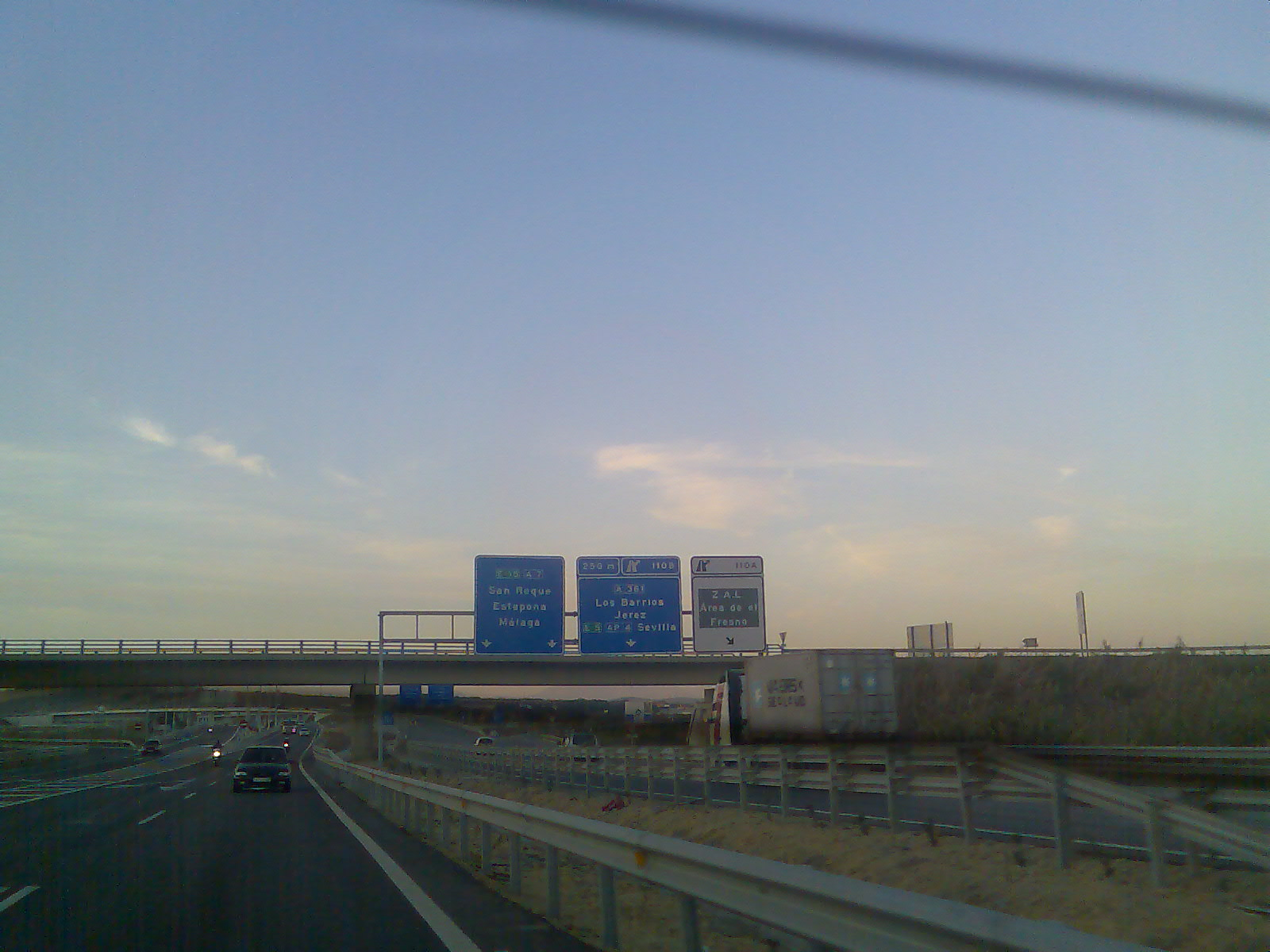 Autovista A7 salida de Algeciras, kilómetro 119 Tomada el 18 de septiembre de 2006 con la cámara de un Nokia 6280 desde un Hyunady atos con maricula de ceuta... LA tome YO MISMO, el autor (a ver si asi no amenazan con borrarmela)